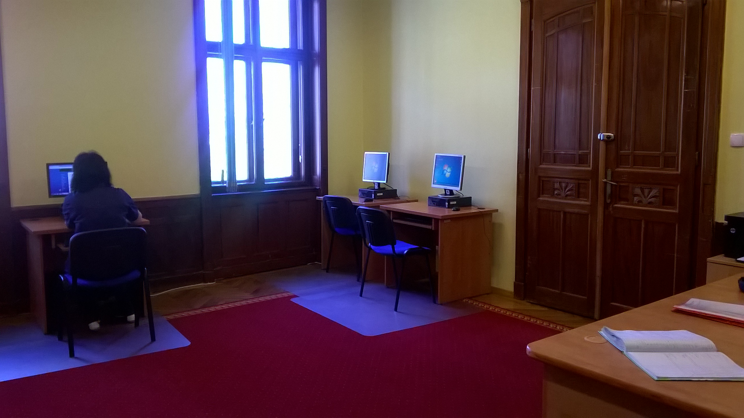 Internetowe Centrum Informacji w PBW w Bielsku-Białej